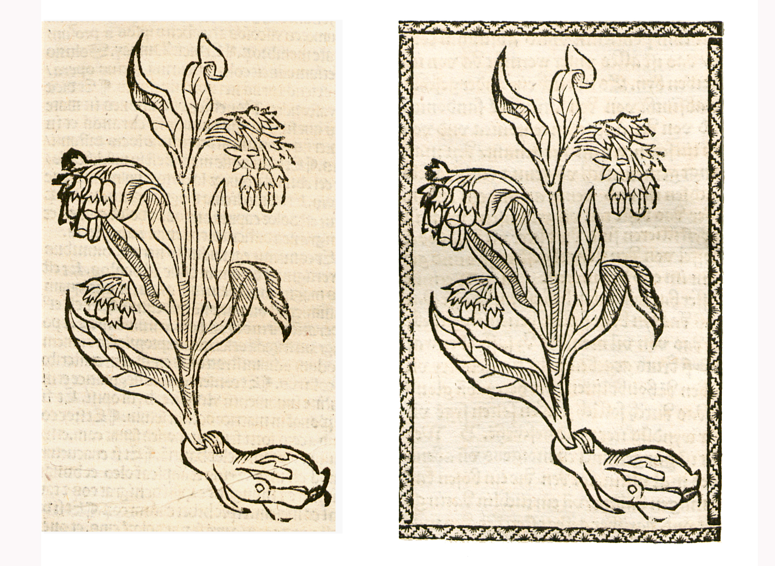 Abbildung von: Walwurtz (Symphytum officinale)